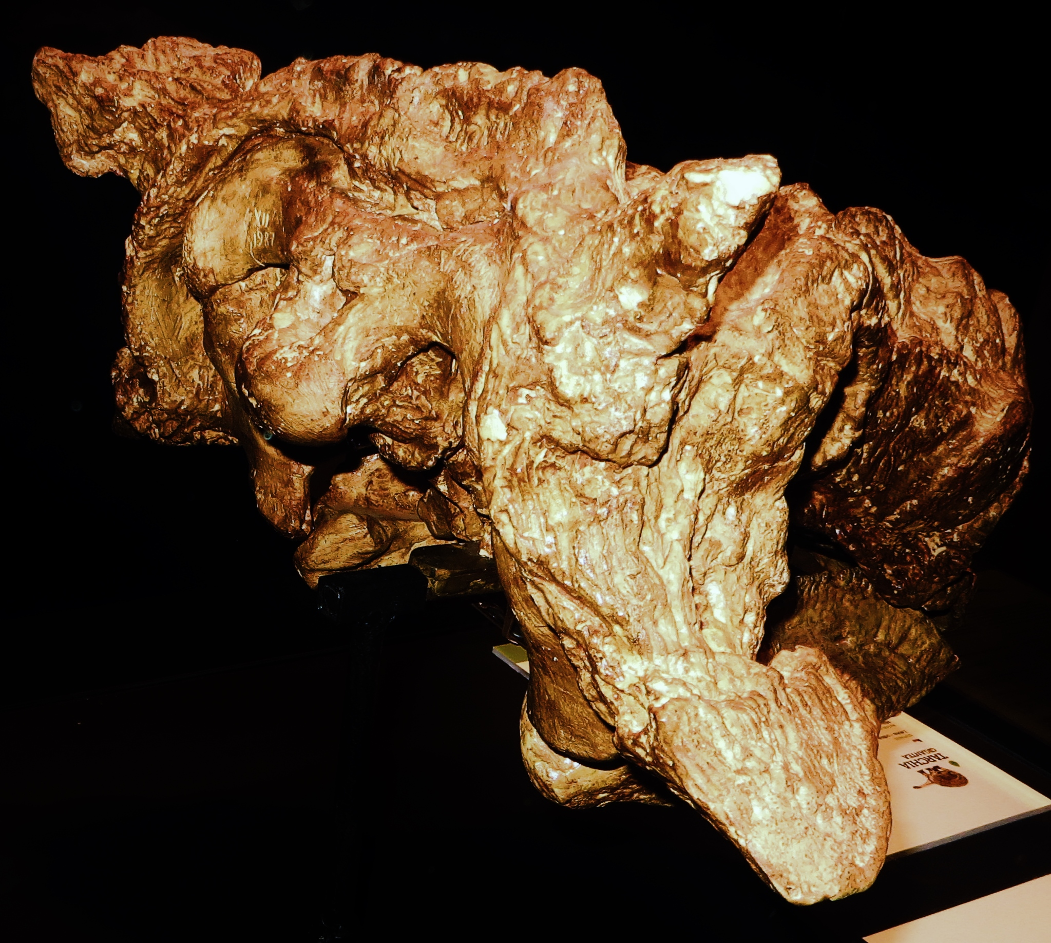 Fossil of Tarchia, an extinct reptile- Took the picture at Dinosaurium, Prague